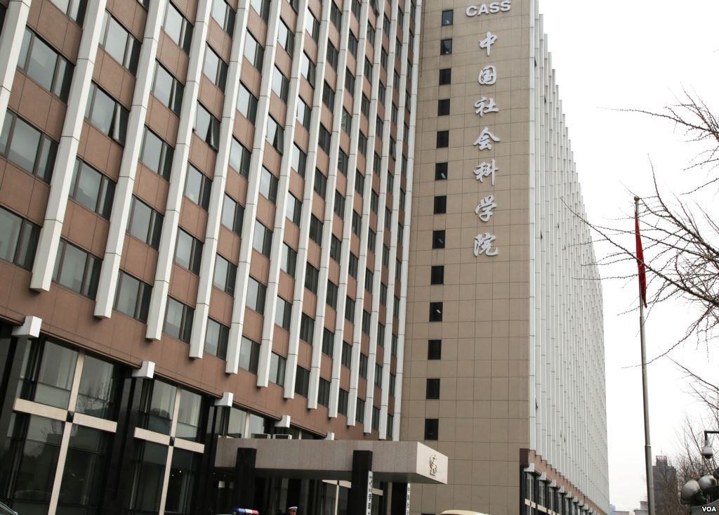 中国社会科学院大楼（美国之音东方拍摄）